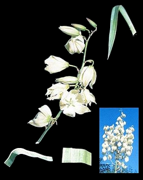 Yucca recurvifolia fh 1183.24 ALA. Gesamtansicht. Original Uploaded with Reworkhelper